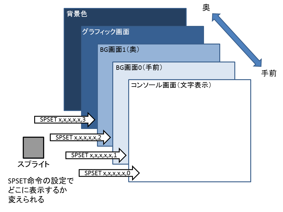 プチコンの画面構成、レイヤー上下関係